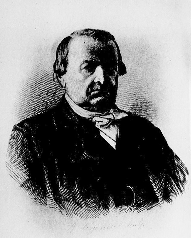 Frédéric Kirschleger, Biographies alsaciennes avec portraits en photographie, série 1